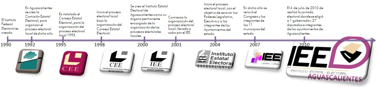 Linea del tiempo que describe los órganos creados para organizar las elecciones en Aguascalientes desde 1992 hasta la fecha.